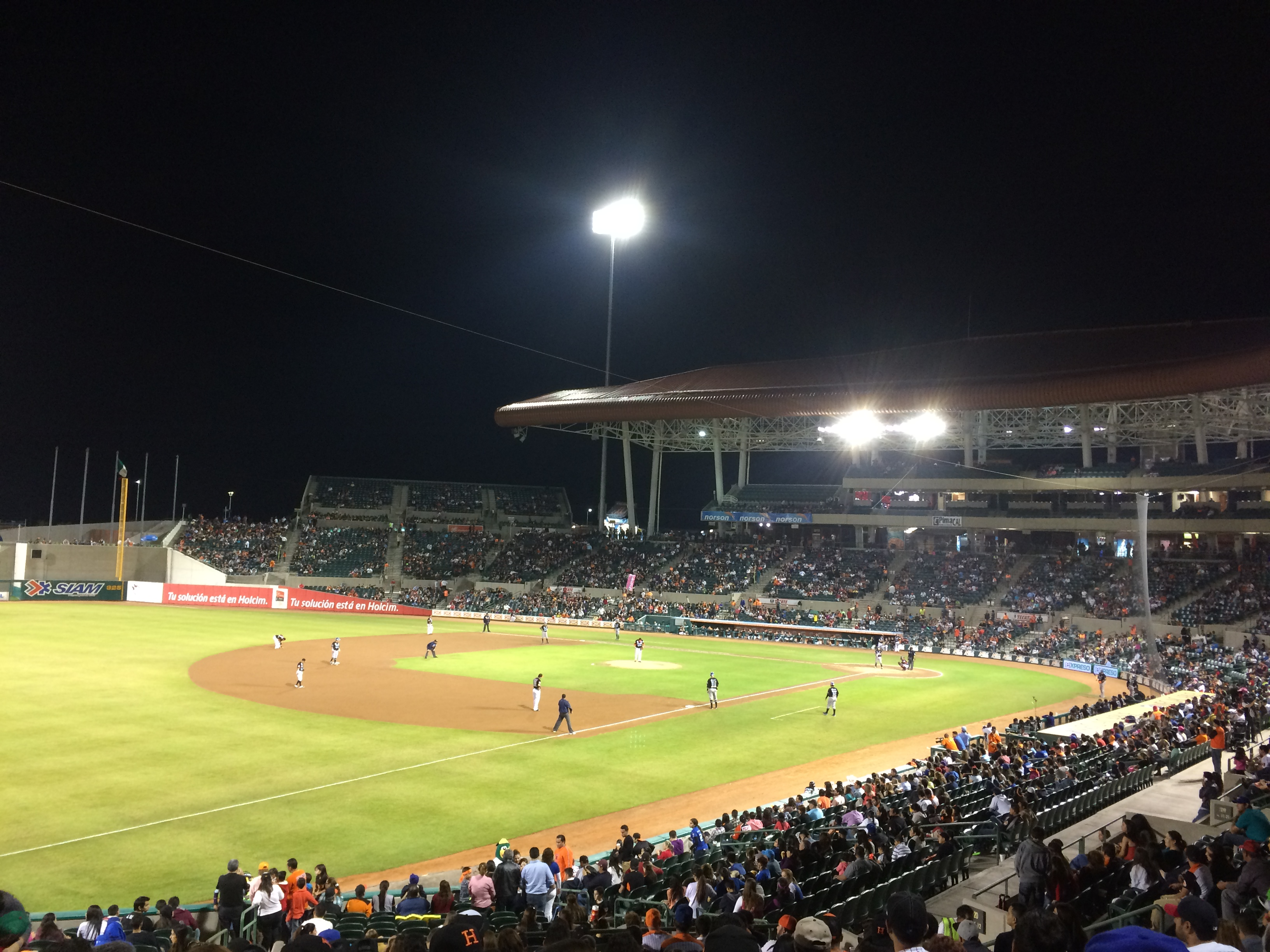 Juego de Naranjeros contra Tomateros en noviembre de 2014. En el Estadio Sonora, Hermosillo, Sonora, México.